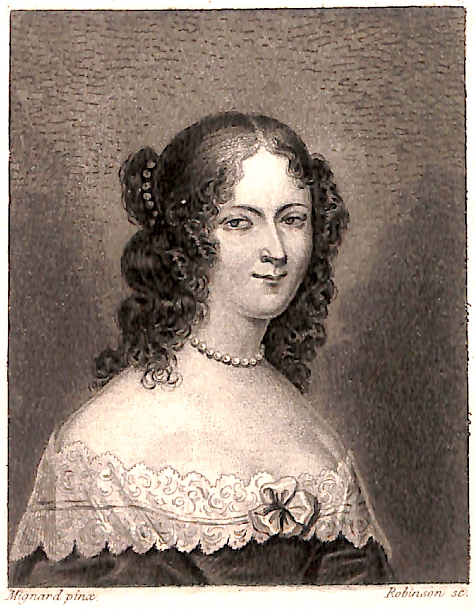 portrait de la baronne de Staal (née De Launay)